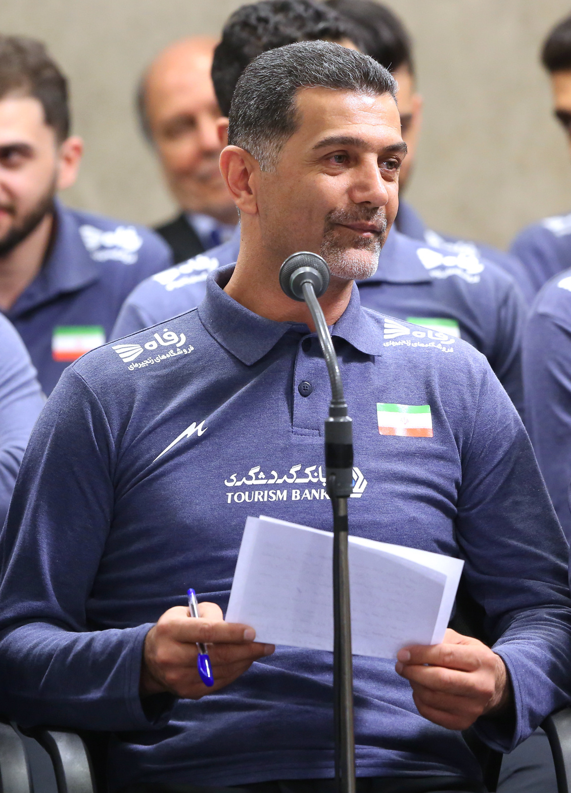 دیدار علی خامنه‌ای با تیم ملی والیبال جوانان ایران